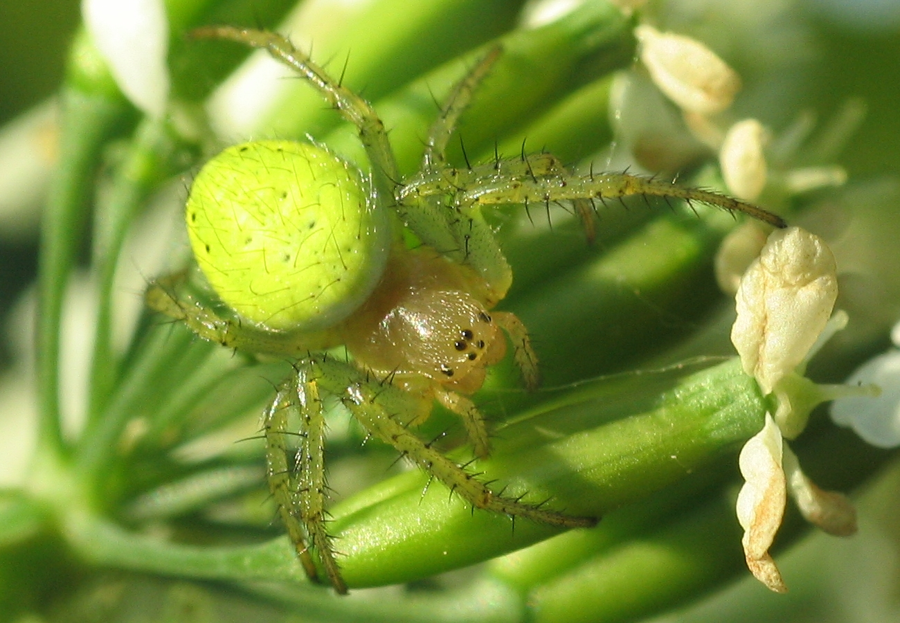 araniella cucurbitina auf Schierling